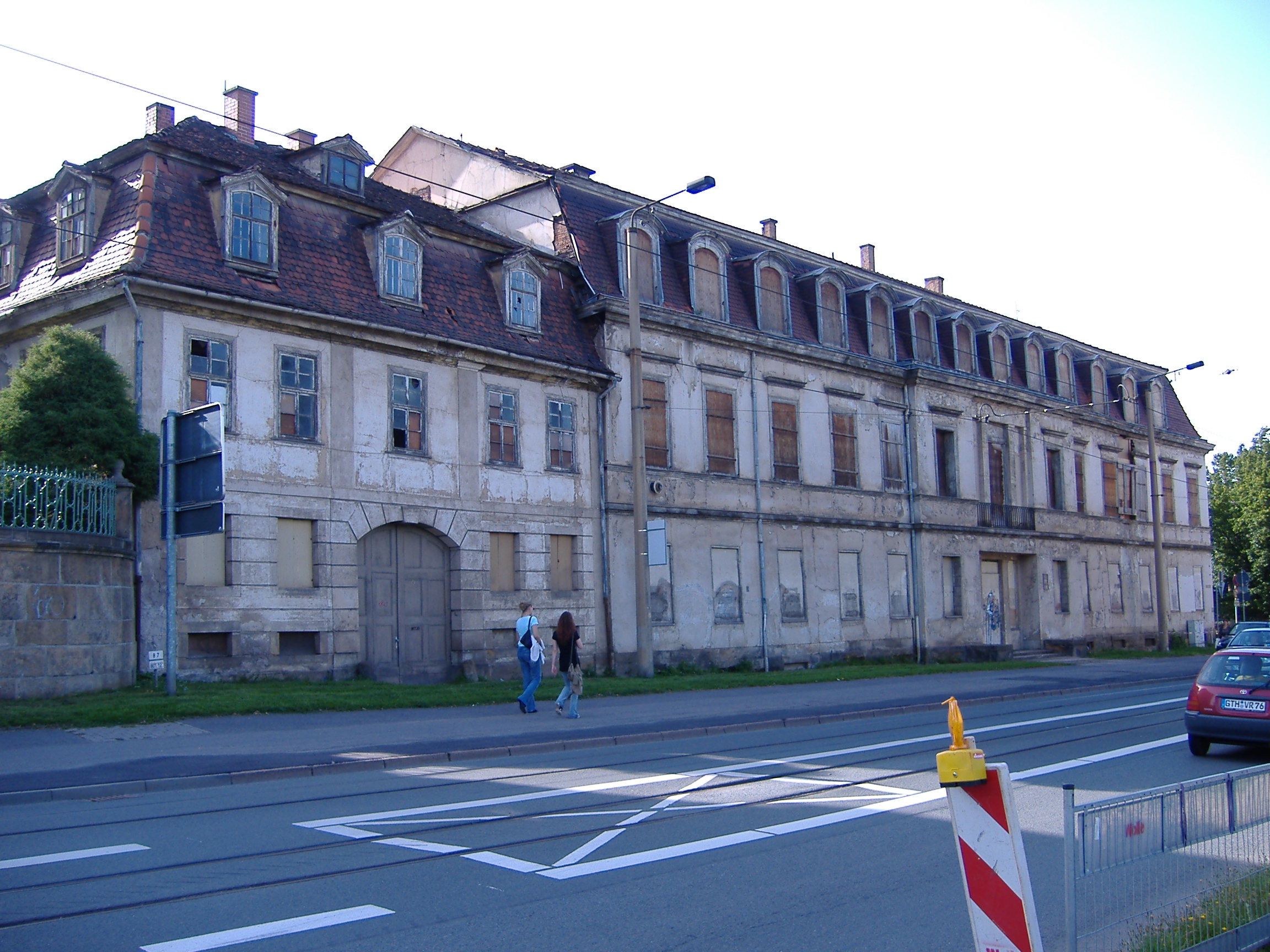 Winterpalais Gotha 2006